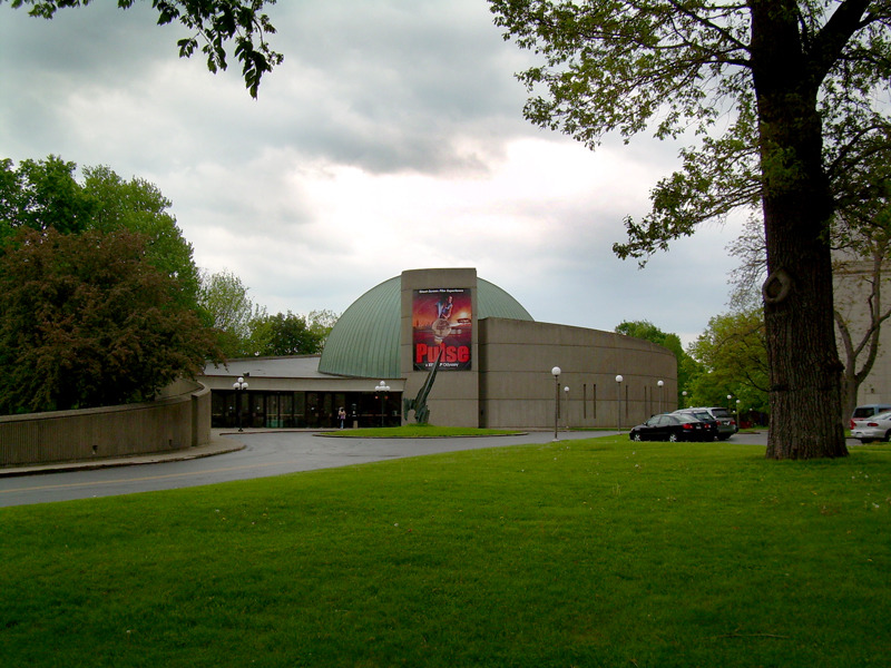 Strasenburgh Planetarium, Rochester Museum & Science Center, Rochester, NY USA